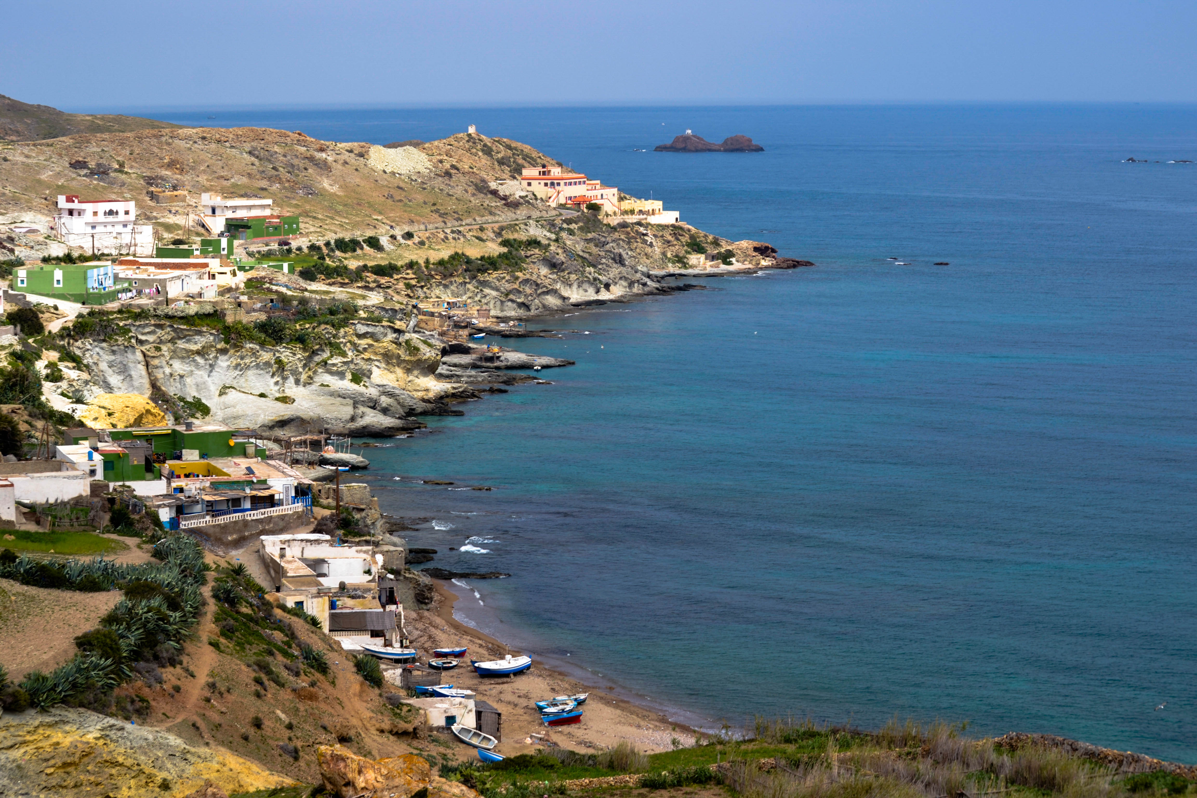 Port traditionel des pêcheurs TIBOUDA Nador Maroc - Brahim FARAJI This is an image with the theme "Africa on the Move or Transport" from: Morocco